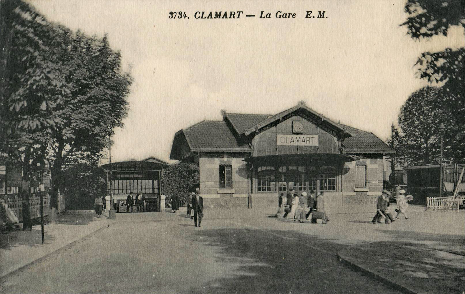 Carte postale ancienne éditée par EM n°3734 : CLAMART - La Gare